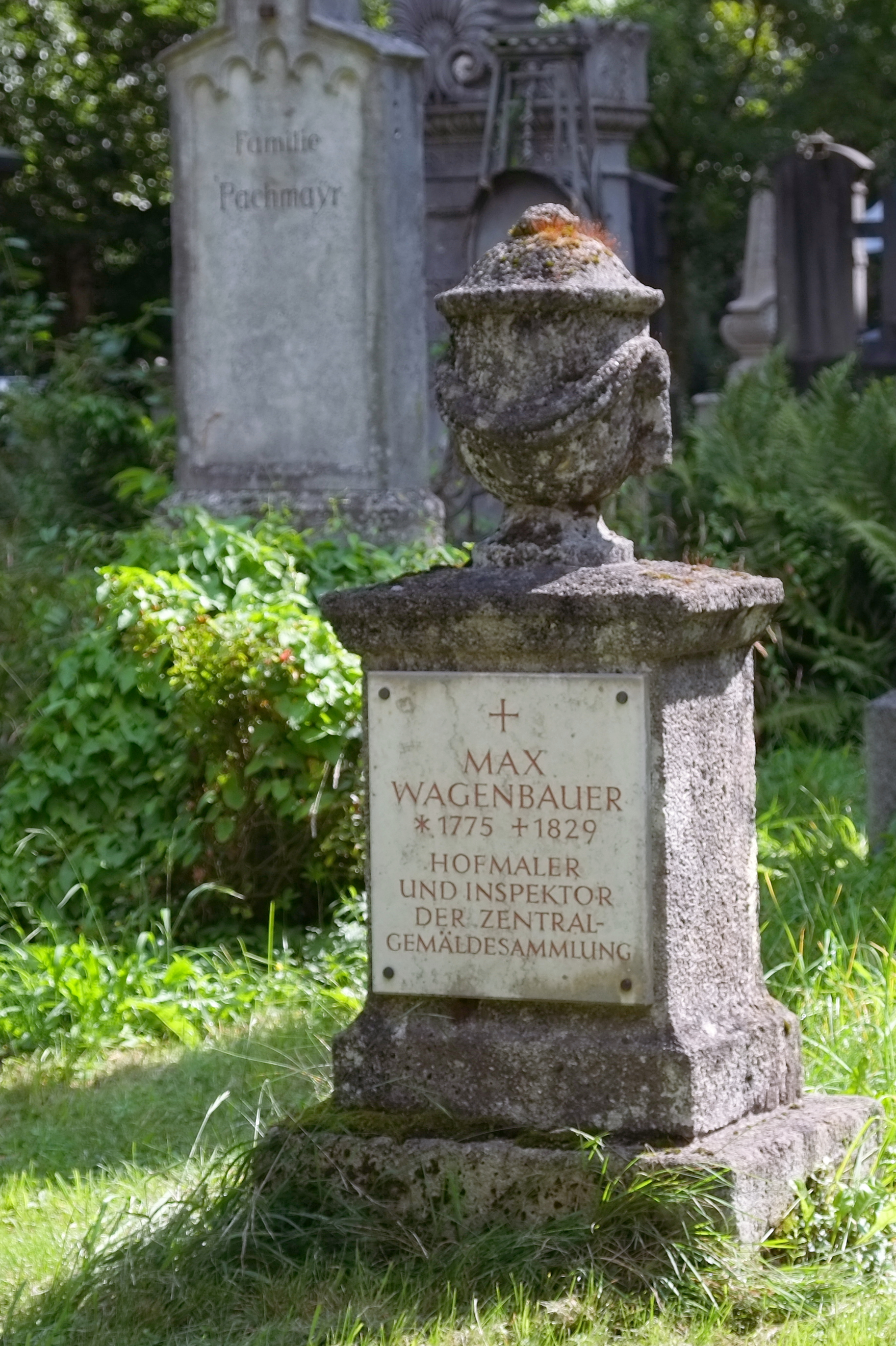 Grabstein für Max Josef Wagenbauer auf dem Alten Südfriedhof in München (Bayern, Deutschland)